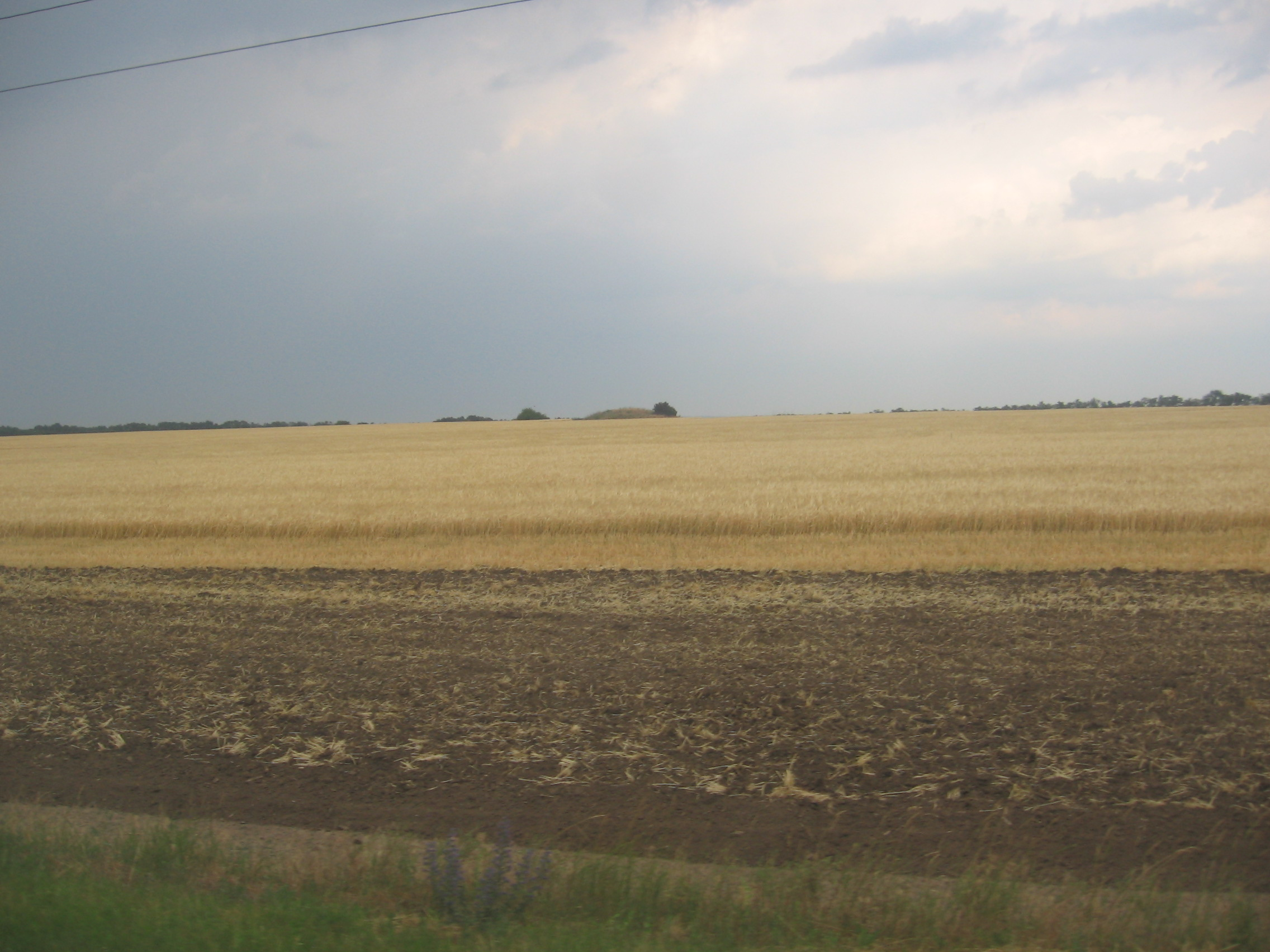 Фото